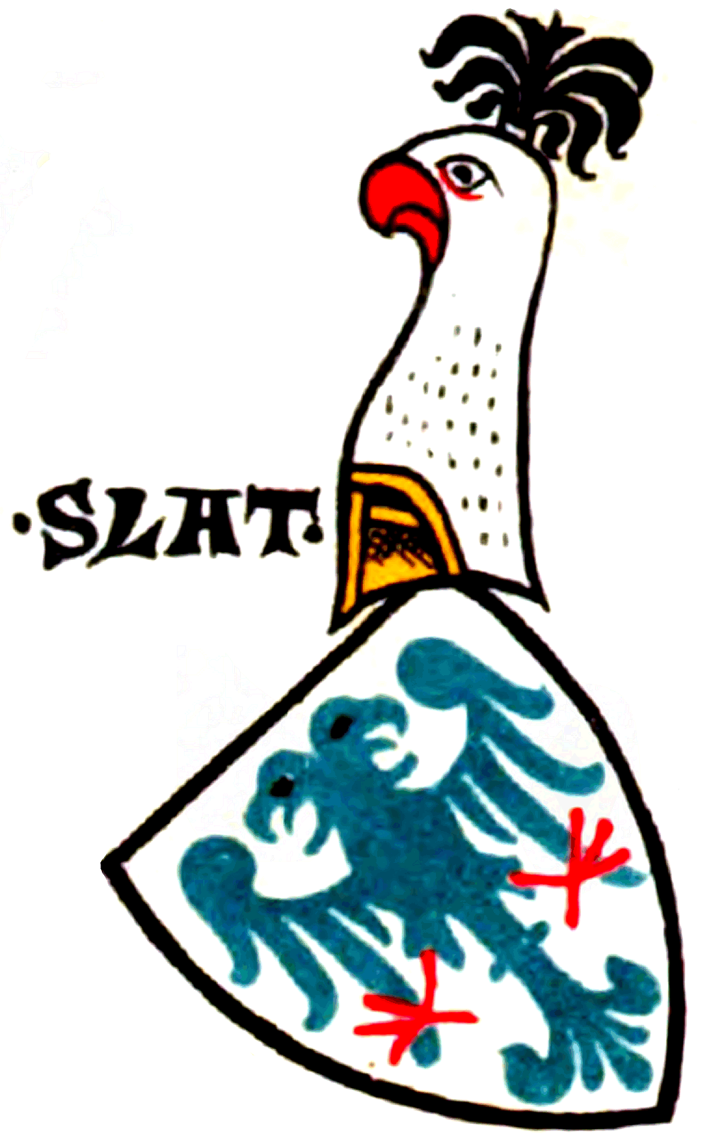 Wappen der Herren von Schlatt (hier Slat)